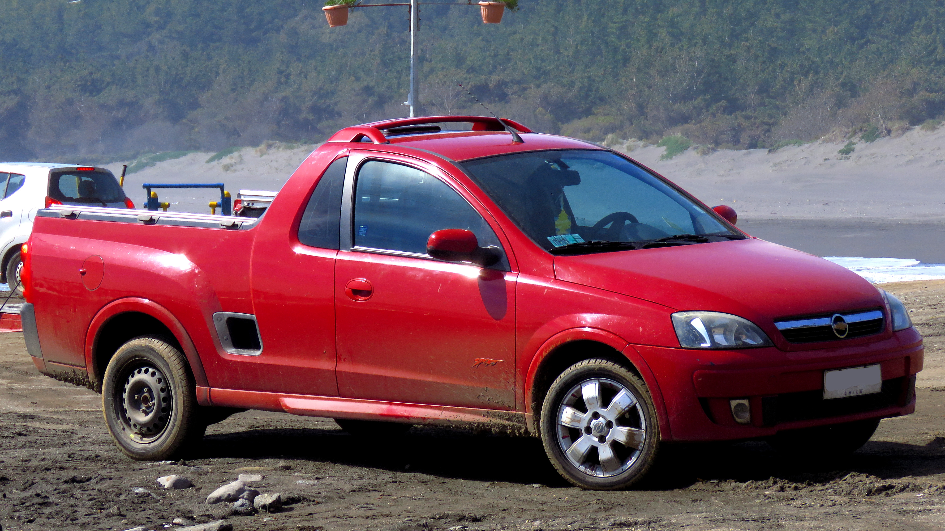 Chevrolet Montana 1.8 Sport 2009